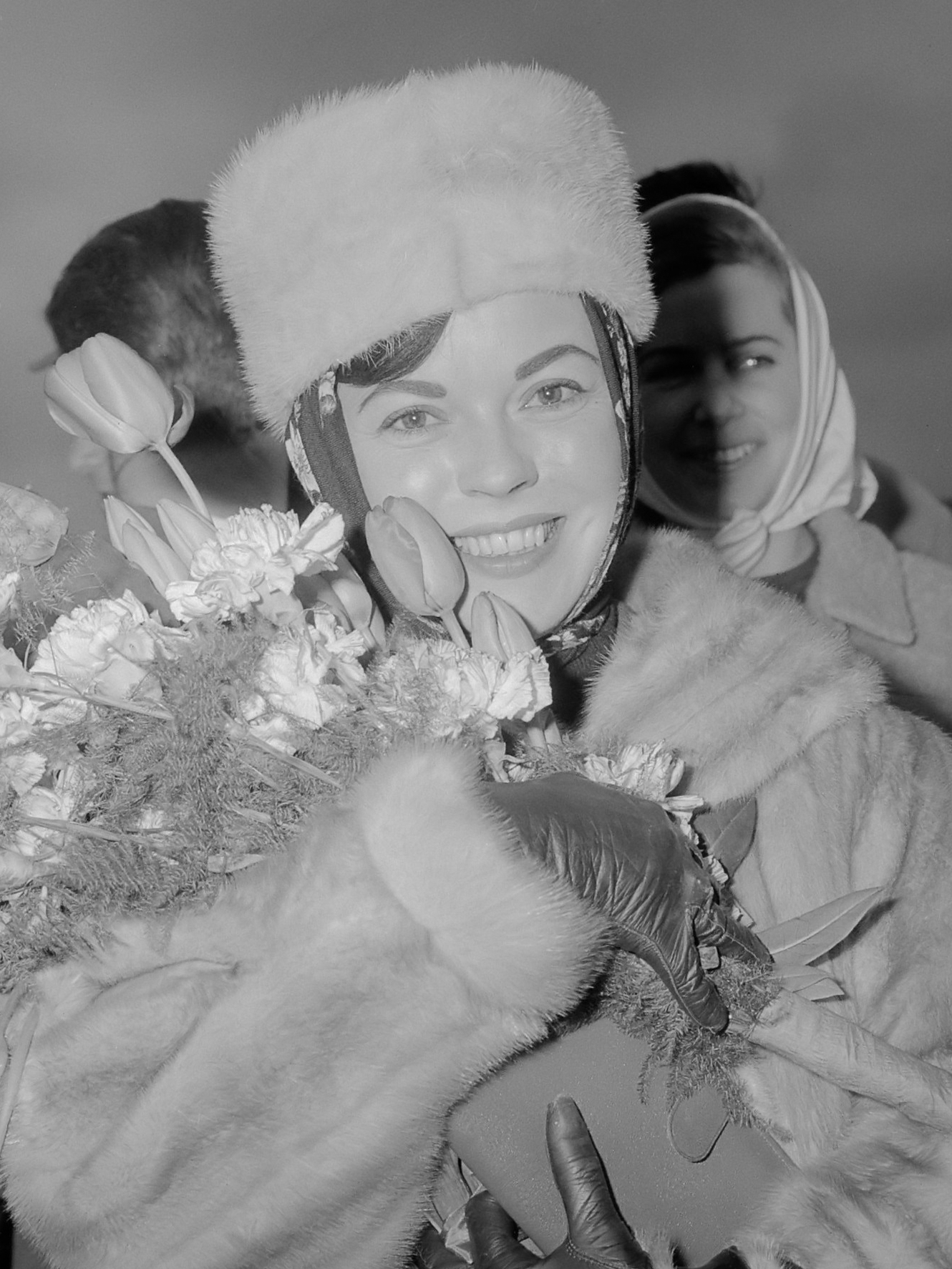 Aankomst Shirley Temple op Schiphol, Shirley Temple 25 maart 1965